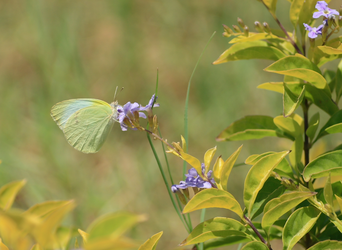 Un macho de la mariposa del Guayacán (Kricogonia lyside) libando en una flor de una hierba cercana a un Guayacán en la Urb. Los Olivos, Maracaibo. Male Lyside sulphur visiting a flower next to a Guayacán in Maracaibo, Northwestern Venezuela.